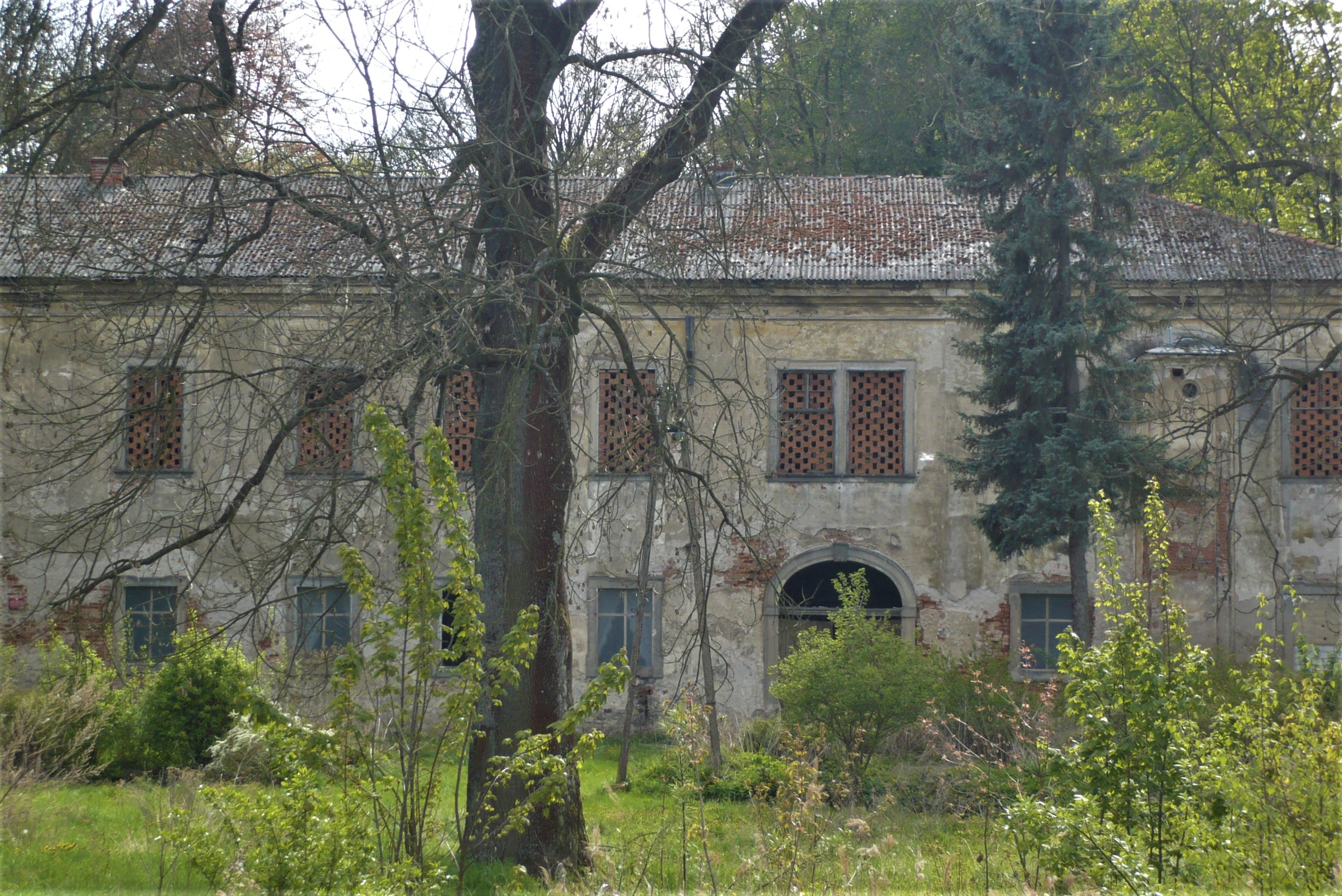 Pałac w Korytowie